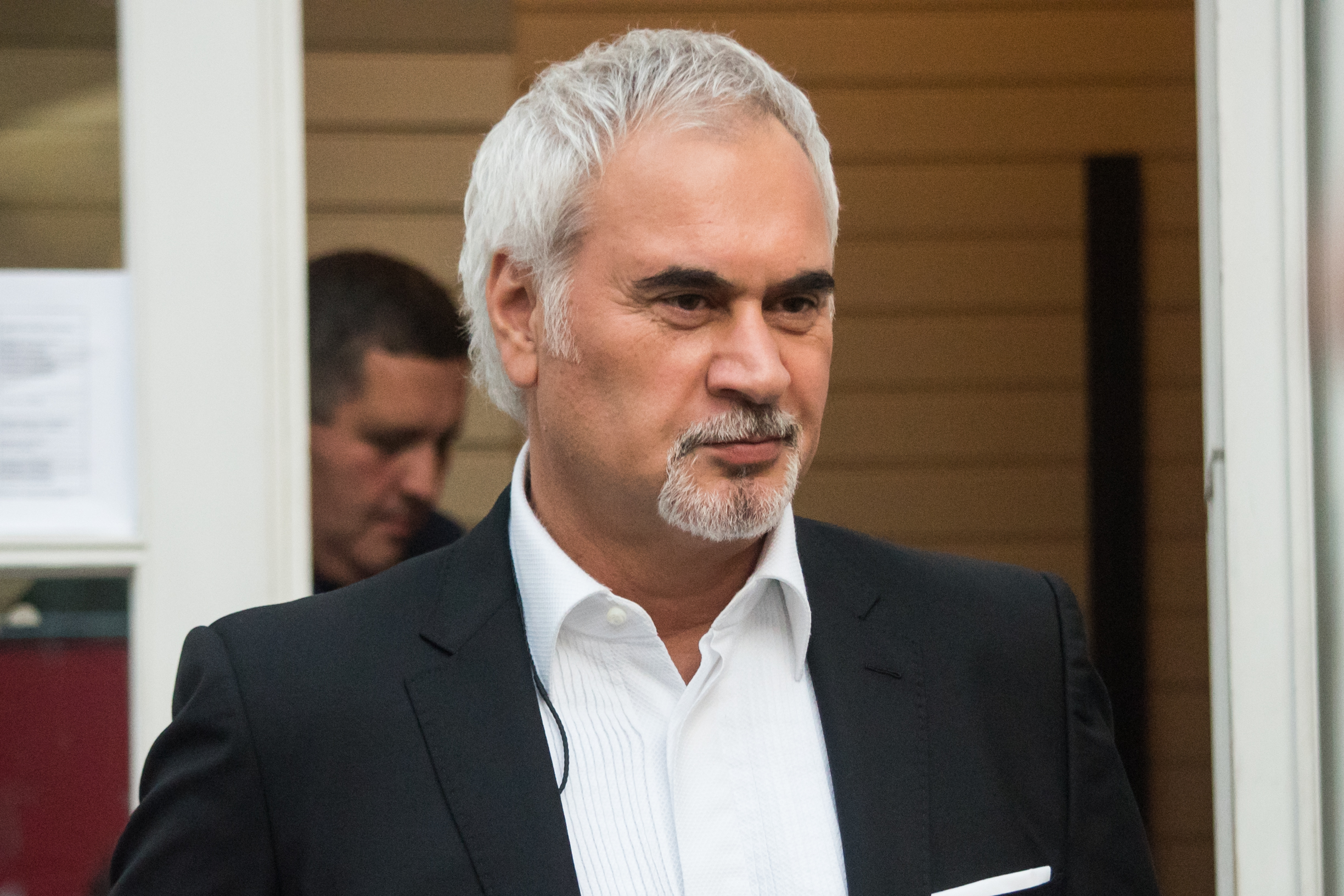 Валерий Меладзе на фестивале «Лайма. Рандеву. Юрмала 2017»